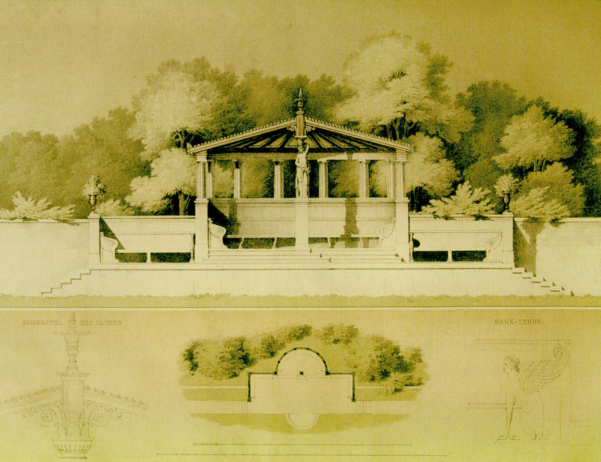 Stibadium Veröffentlichung im Architektonischen Skizzenbuch 1852